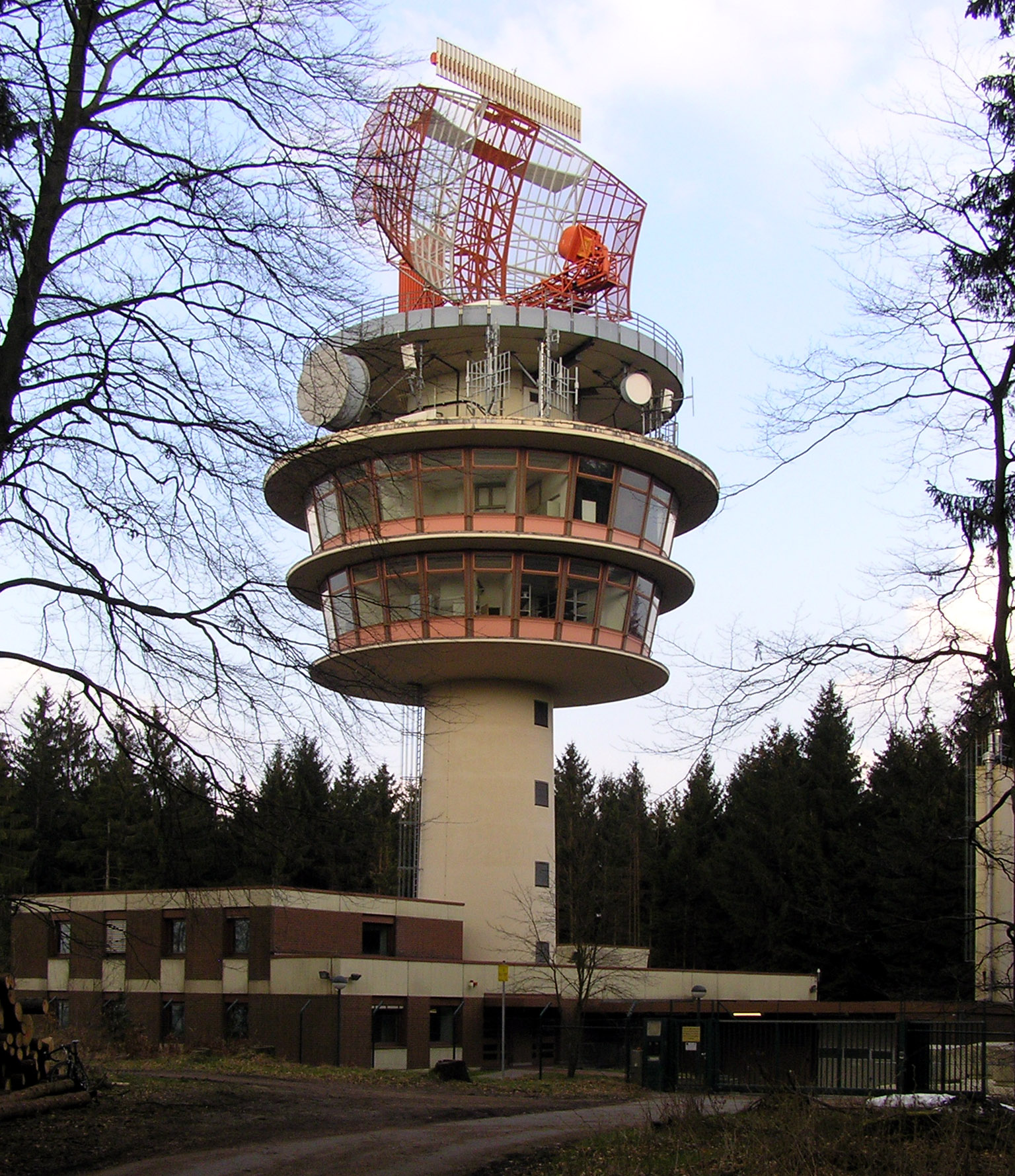 Der Radarturm auf der Neunkirchner Höhe im Odenwald